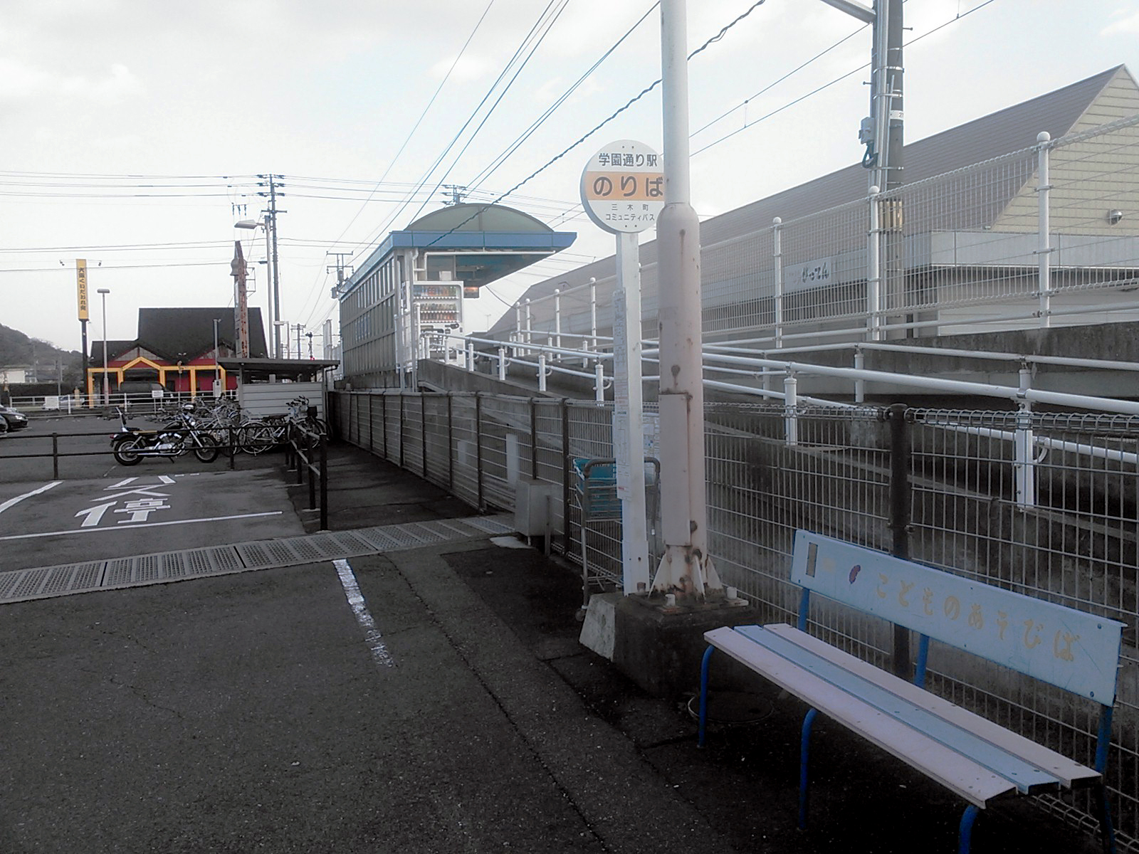 三木町コミュニティバス学園通りバス停留所。投稿者自身による撮影。